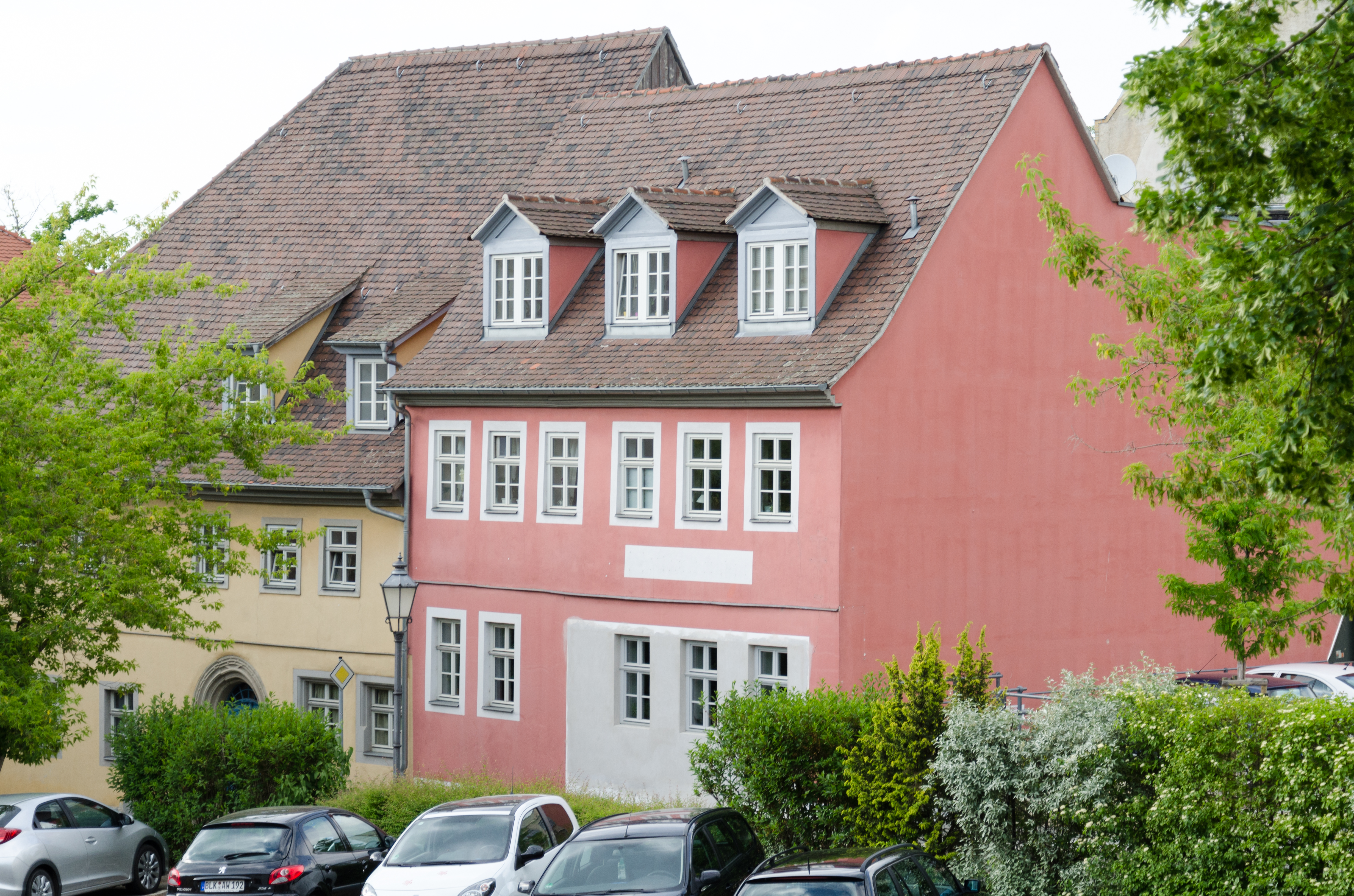 Zeitz, Messerschmiedestraße 4